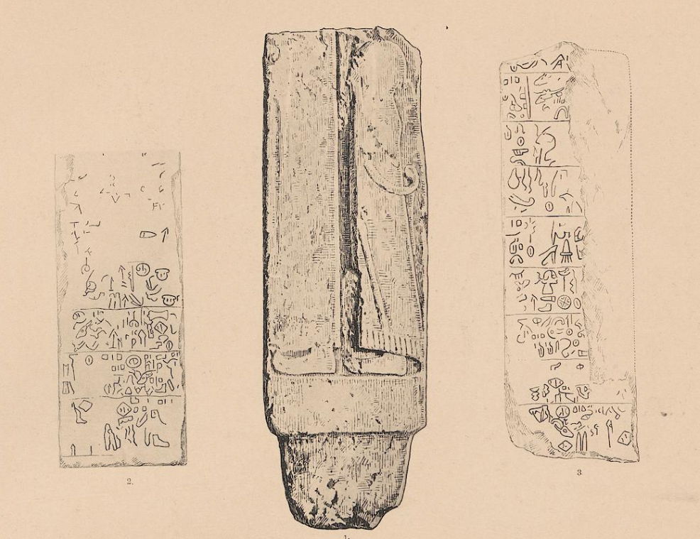 Späthethitische Stele Samsat 1, Zeichnung